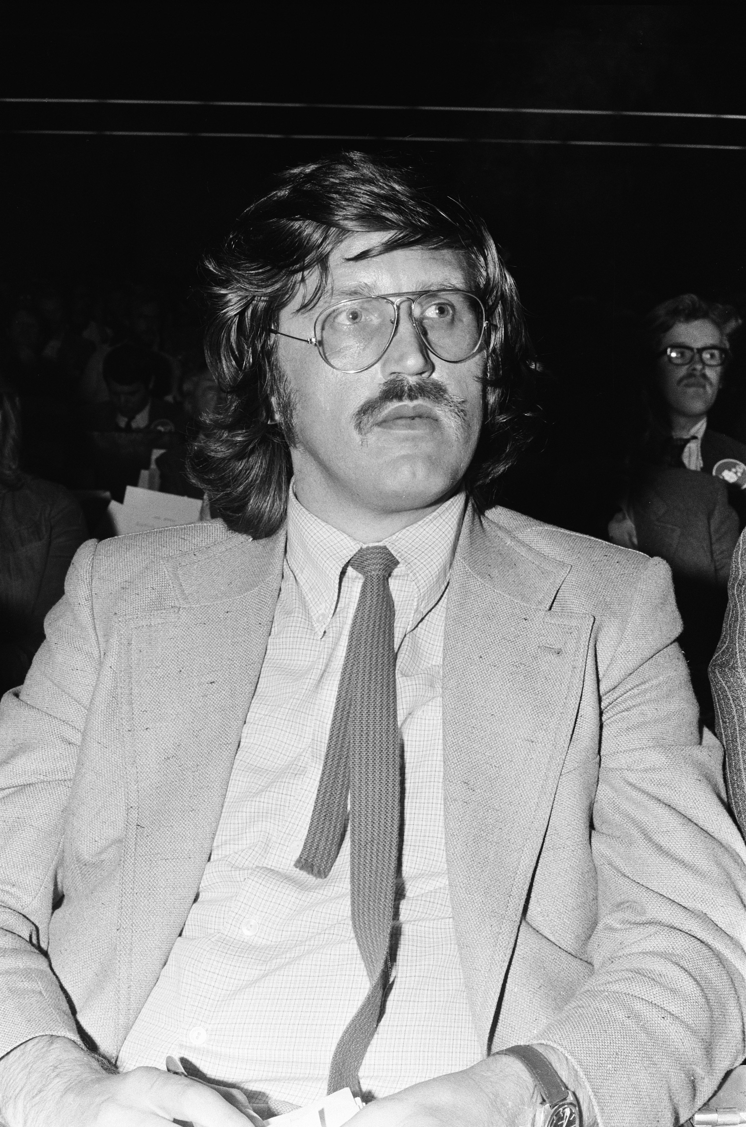 Collectie / Archief : Fotocollectie Anefo Reportage / Serie : [ onbekend ] Beschrijving : Congres PvdA over vrede en veiligheid in RAI; nr. 29 A. Peper (kop) Datum : 10 april 1975 Trefwoorden : congressen Persoonsnaam : A. Peper Instellingsnaam : PvdA, RAI Fotograaf : Verhoeff, Bert / Anefo Auteursrechthebbende : Nationaal Archief Materiaalsoort : Negatief (zwart/wit) Nummer archiefinventaris : bekijk toegang 2.24.01.05 Bestanddeelnummer : 927-8640